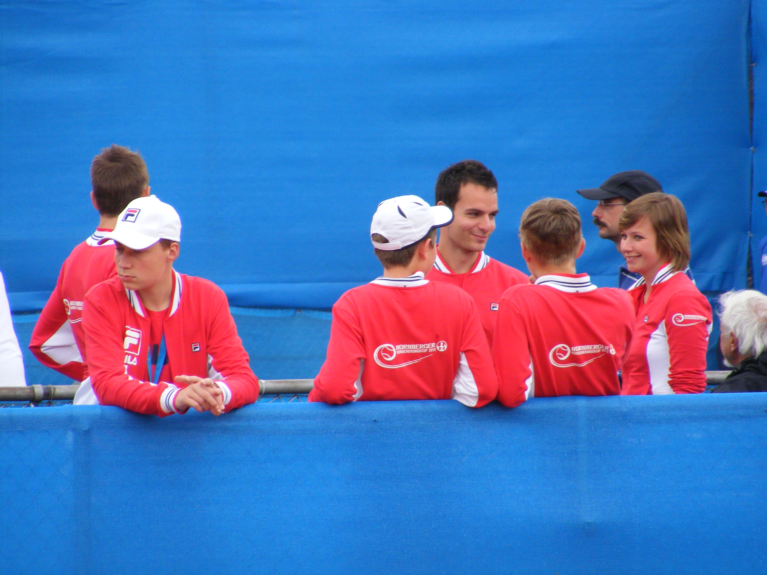 Linienrichter beim WTA World Tour International Turnier "Nürnberger Versicherungscup 2013"